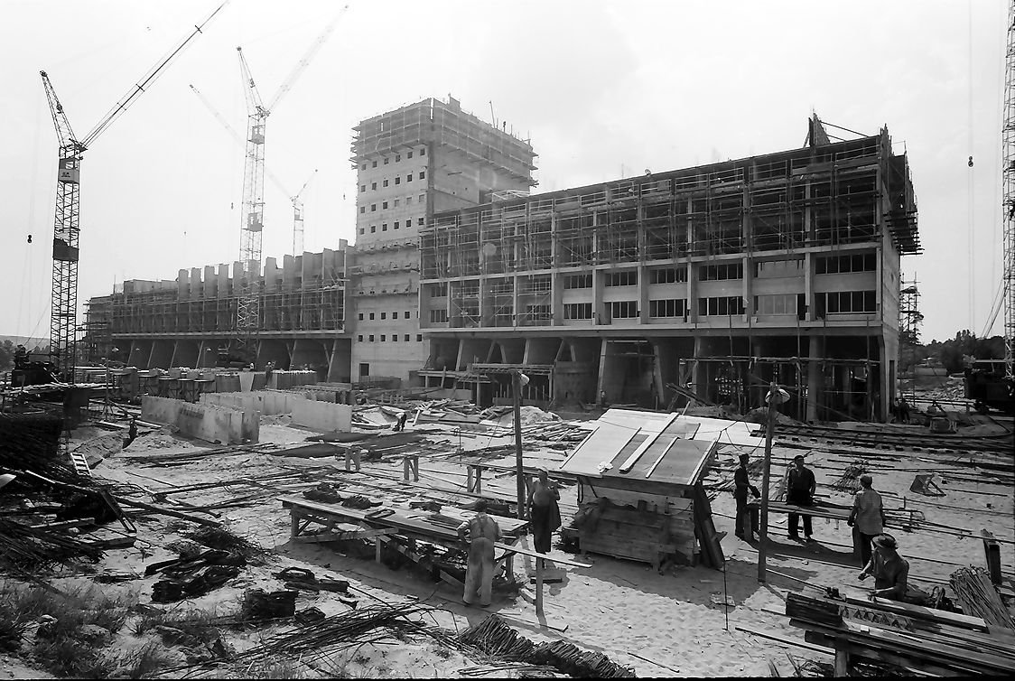 Berlin: Interbau; Corbusierhaus im Bau; Ostseite